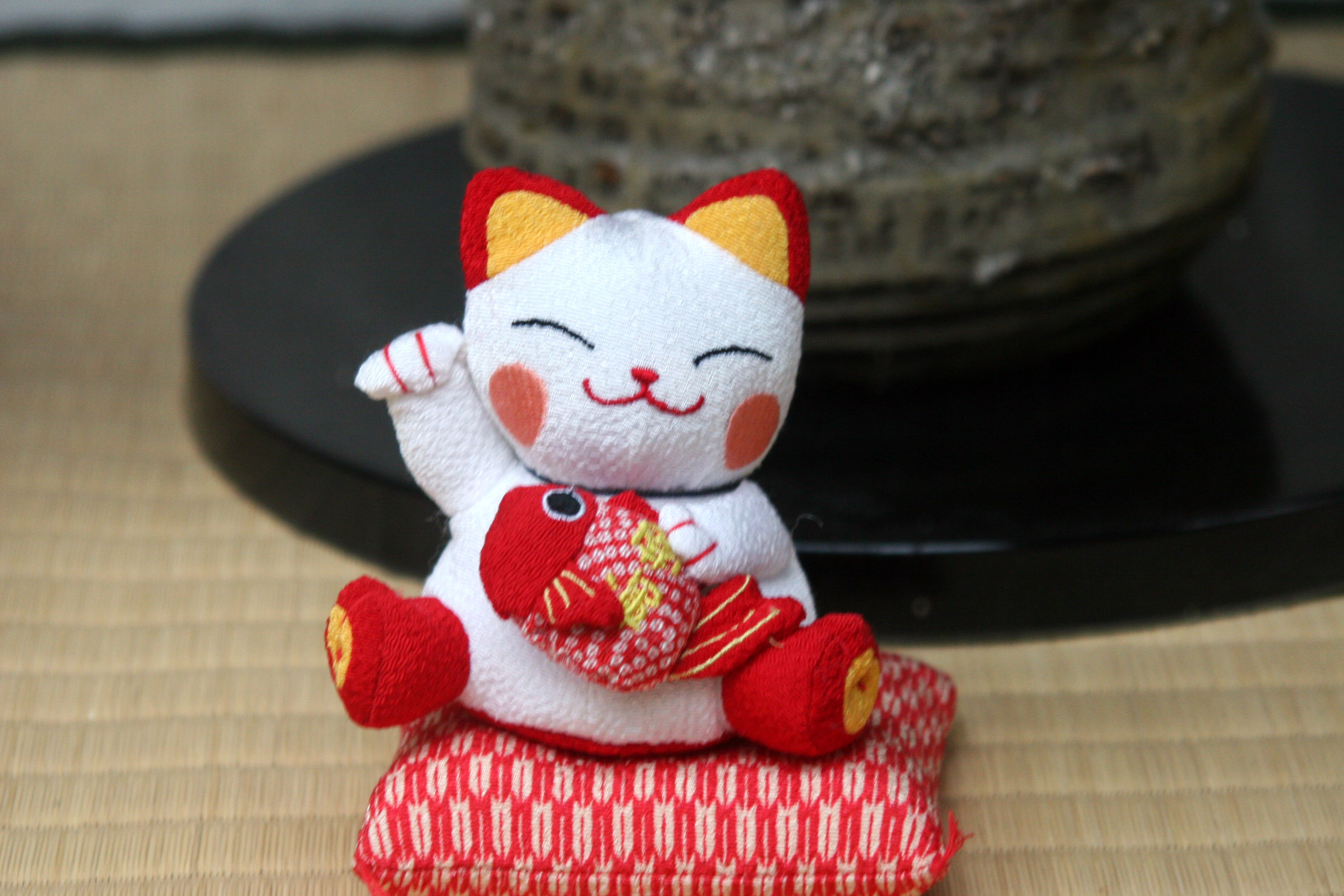 Ginza, Tokyo Japan